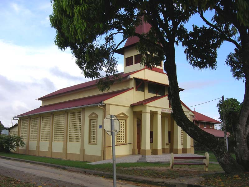 L'église Sainte-Catherine - Kourou (2006)